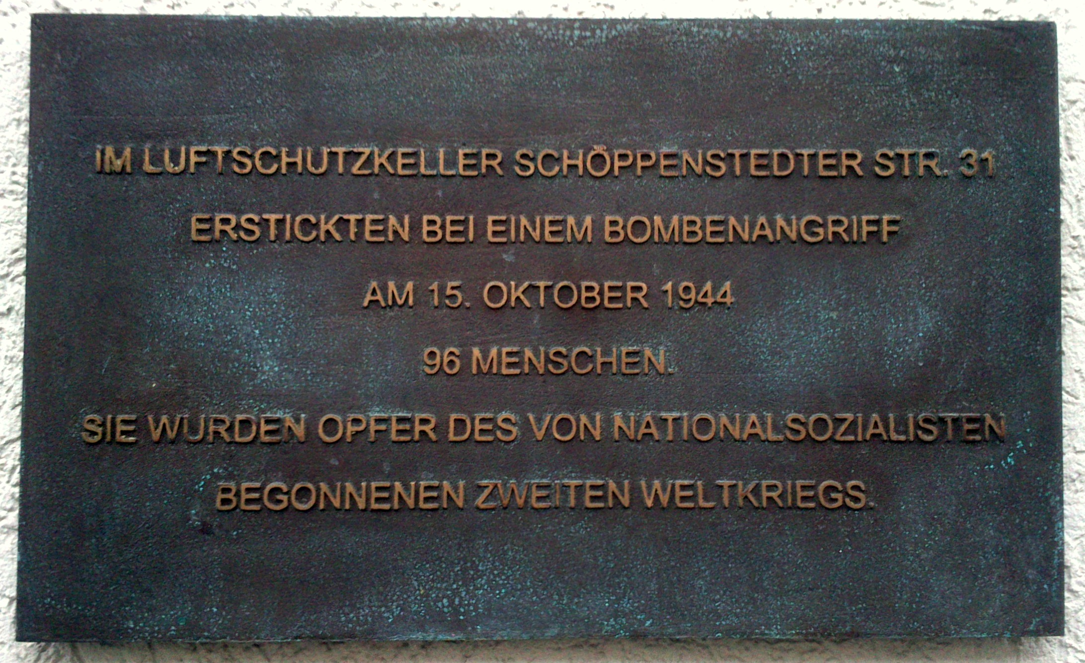 Braunschweig, Schöppenstedter Straße 31: Gedenktafel für 96 Opfer des Bombenangriffs vom 15. Oktober 1944, die hier in einem Luftschutzkeller erstickt sind.